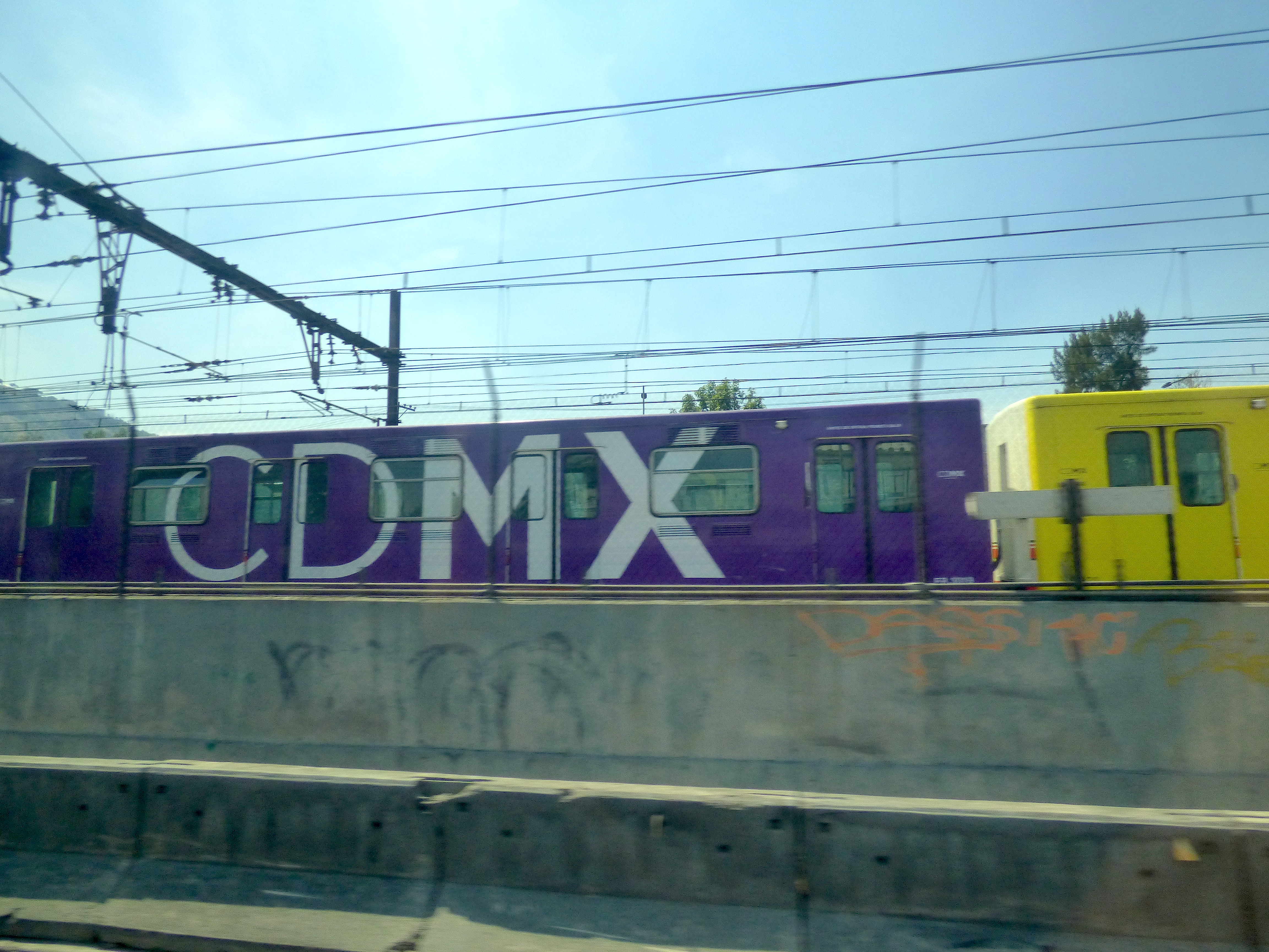 Trenes de la Estación A del Metro de la Ciudad de México